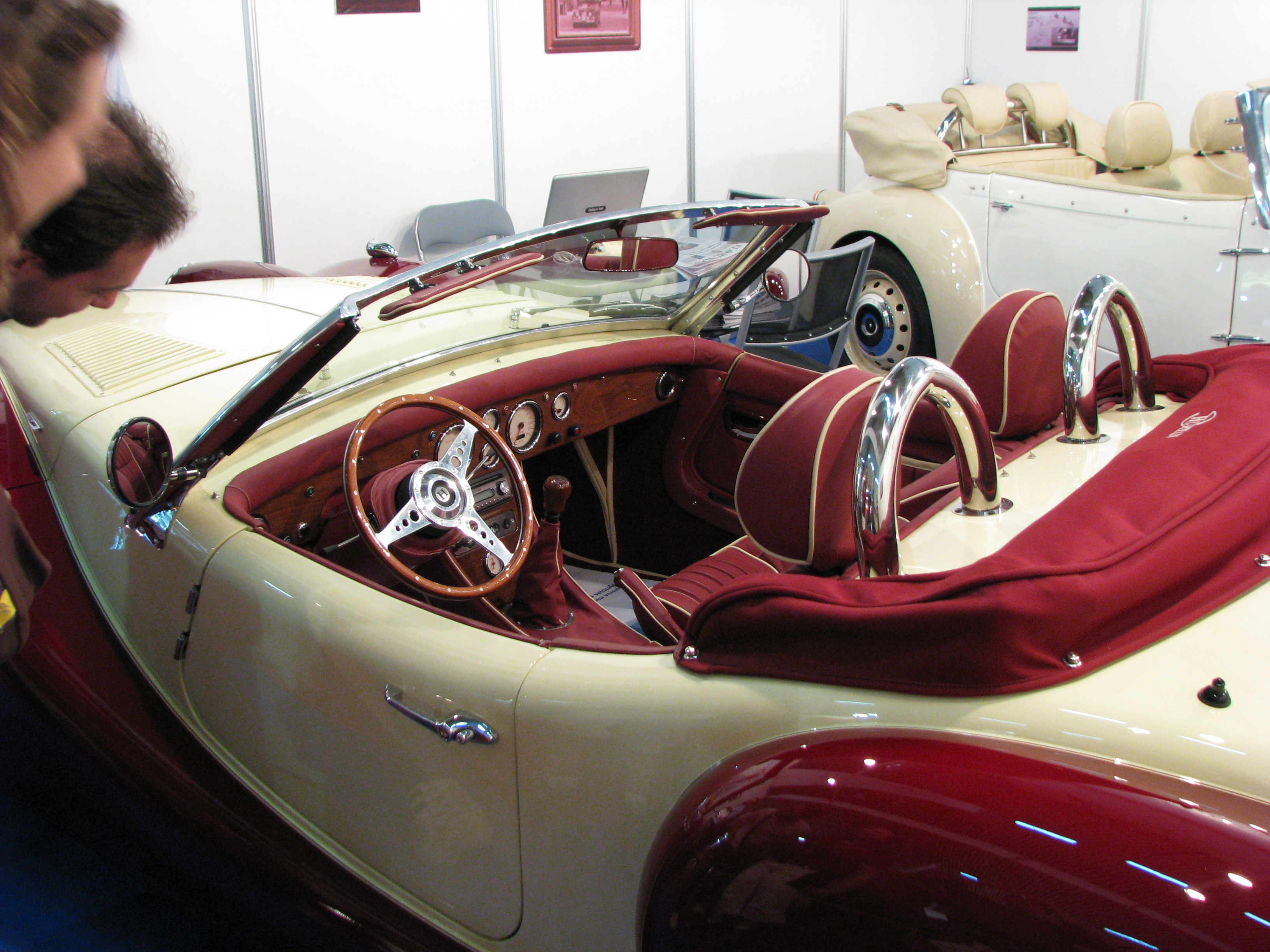 Hurtan Albaycín T2 en el Salón Internacional del Automóvil de Barcelona 2009.